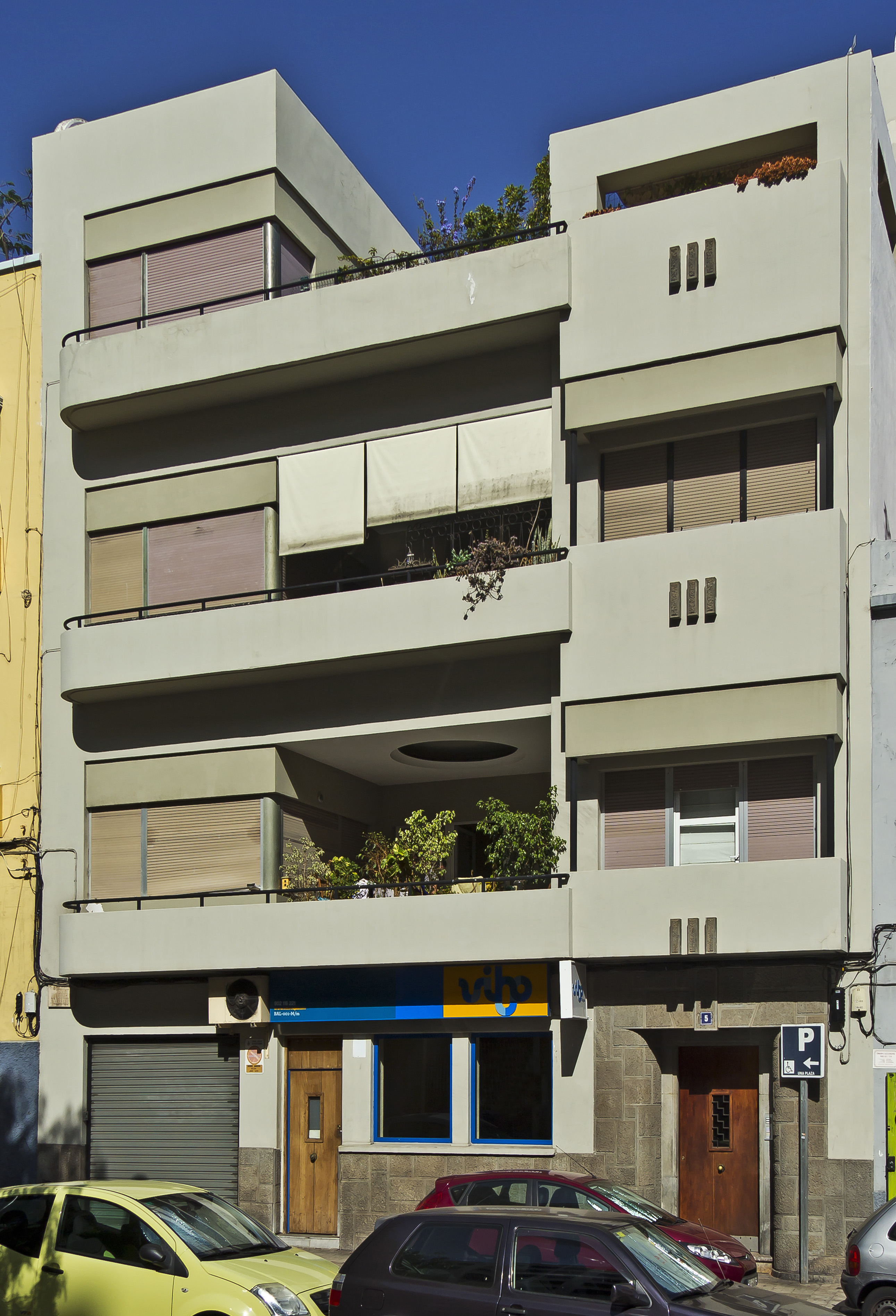 Eigenes Wohn- und Bürohaus des Architekten José Enrique Regalado in Santa Cruz de Tenerife